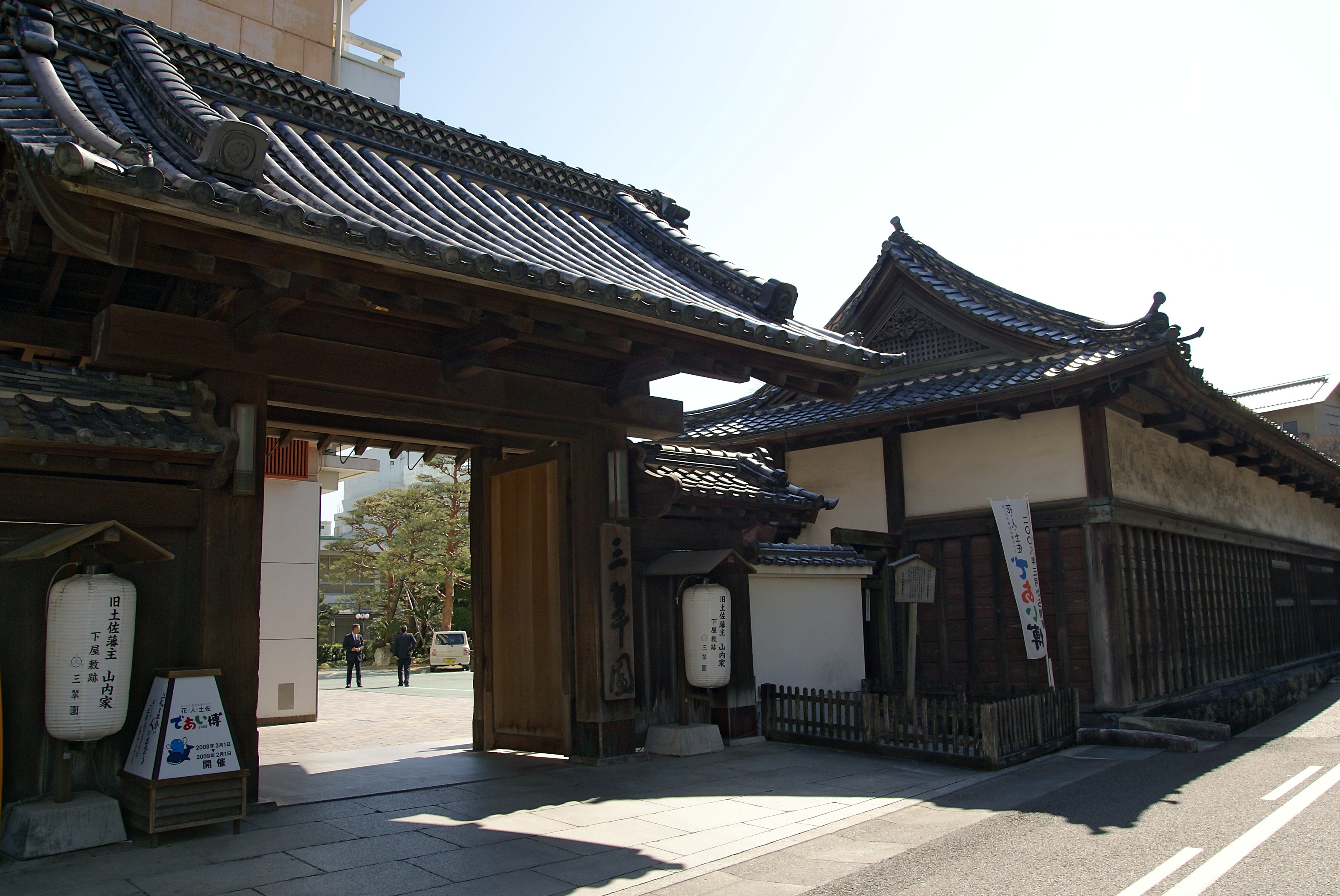 Kyu-Yamauchike Shimoyashiki Nagaya in Kochi, Kochi prefecture, Japan